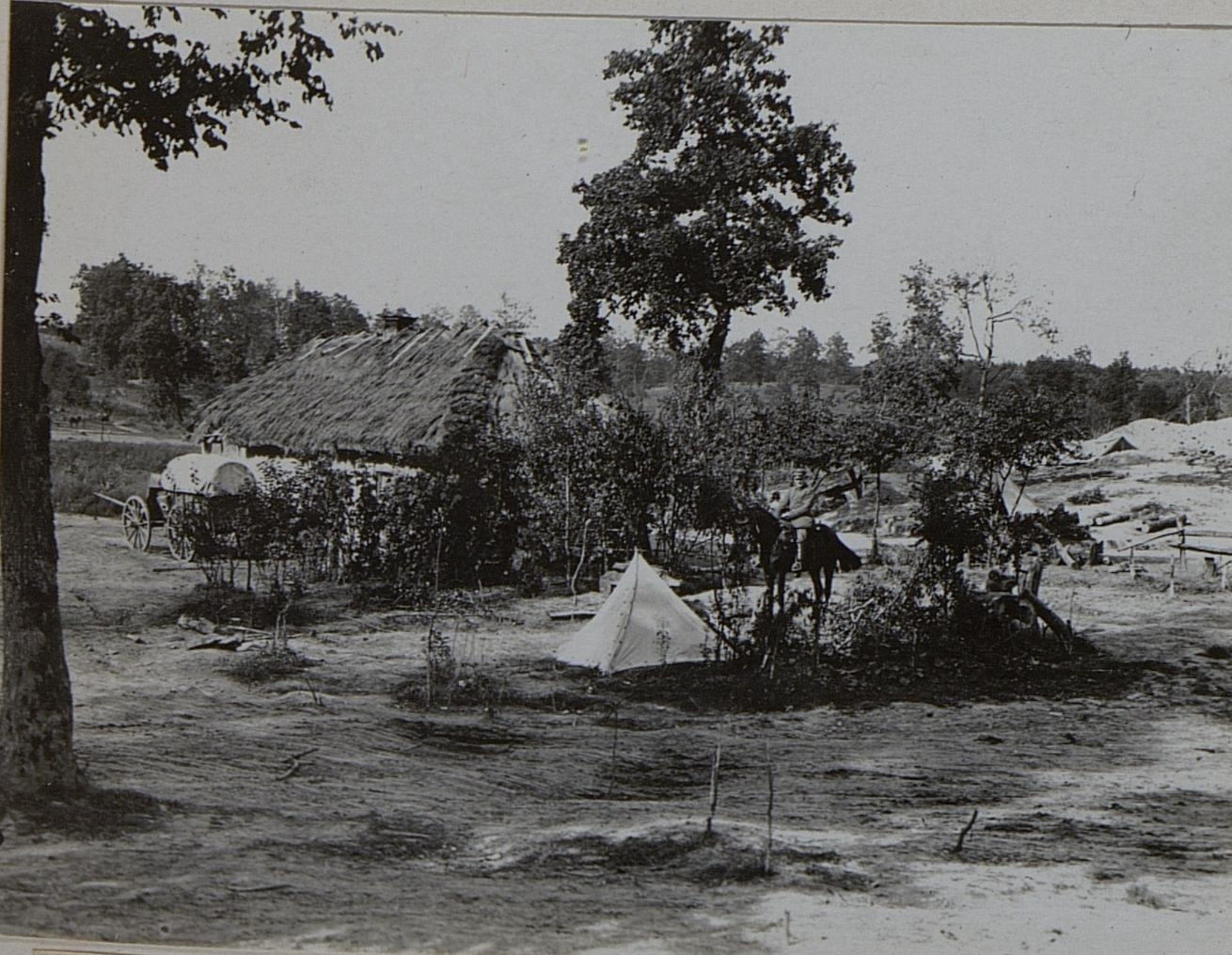 Kaiserschanze in Szelwowo